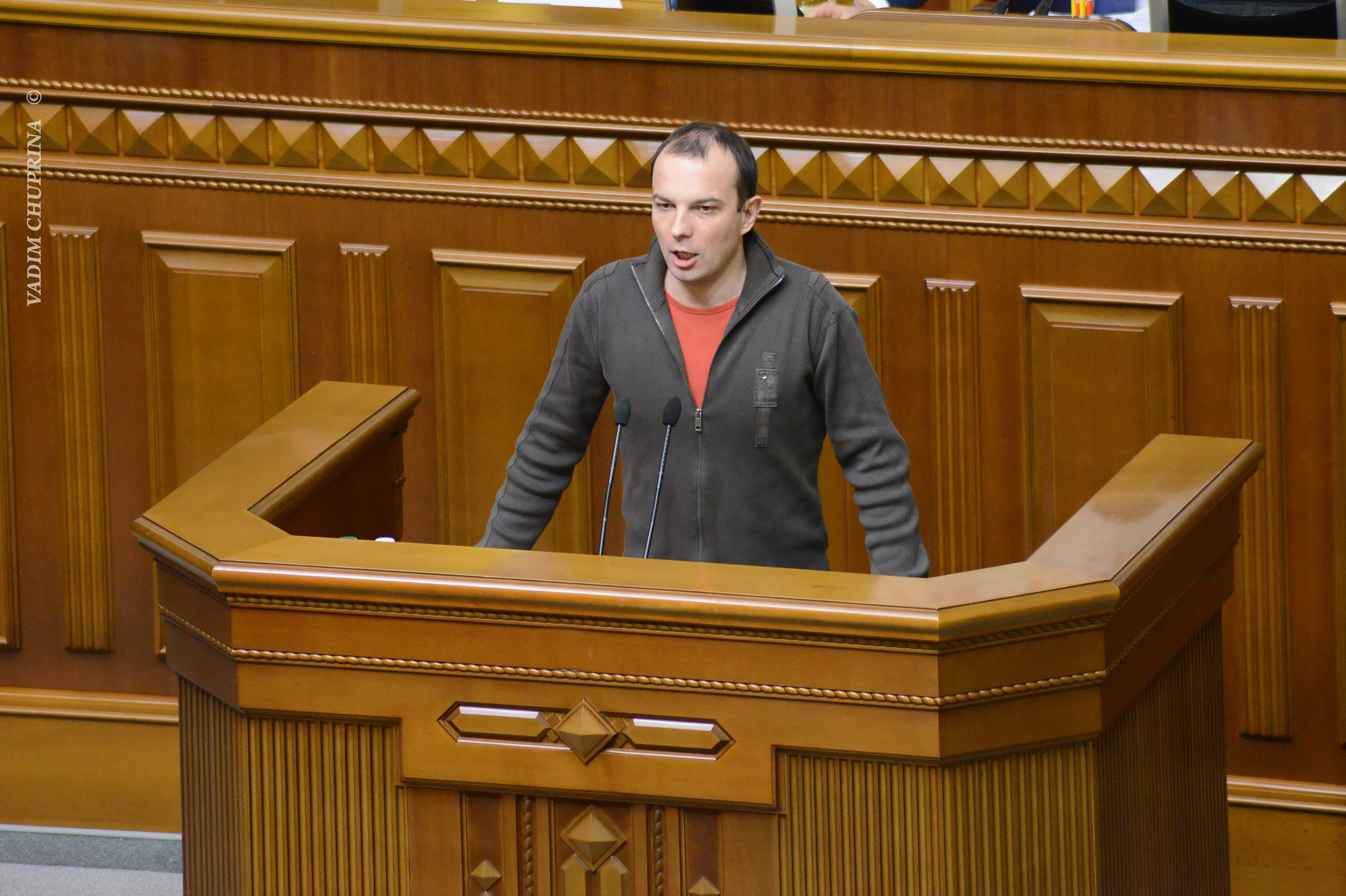 ВЕРХОВНА РАДА УКРАЇНИ 2015 фотограф Вадим Чуприна